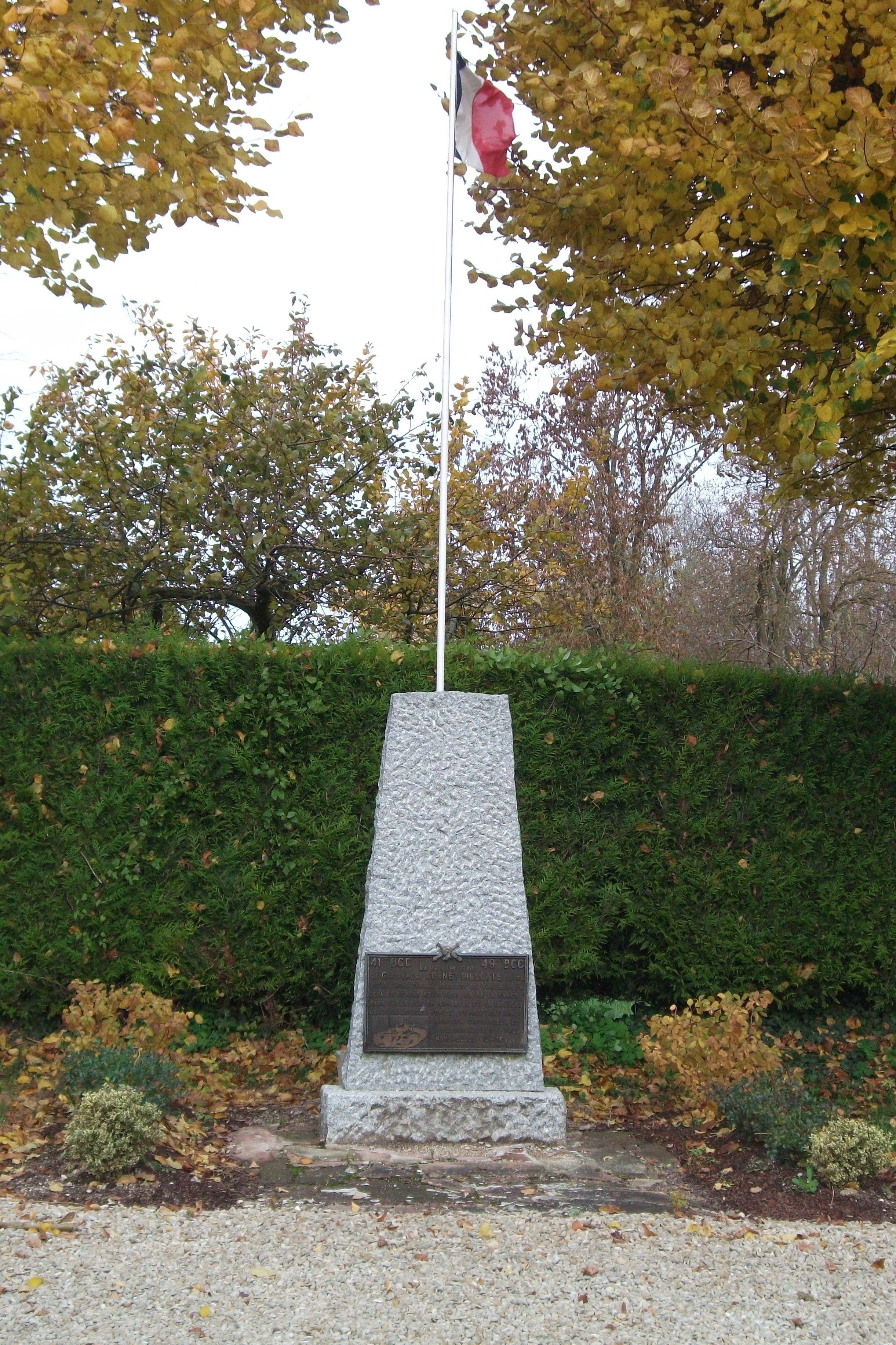 Monument en hommage aux combats du 12 juin 1940 du 41e et du 49e B.C.C de la 3e division cuirassée; il se trouve dans le village de Vadenay (Marne).